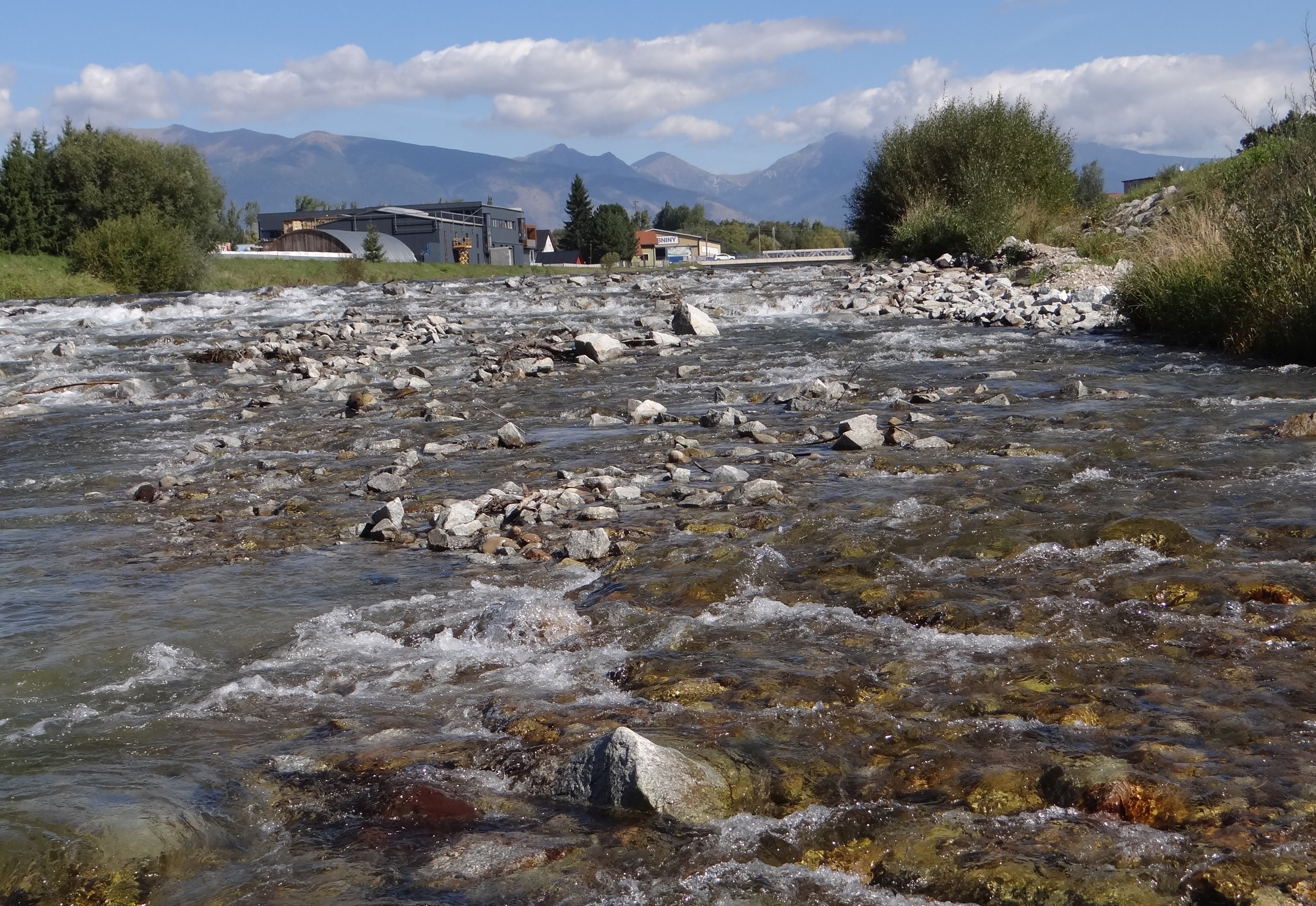 Belá in Liptovský Hrádok